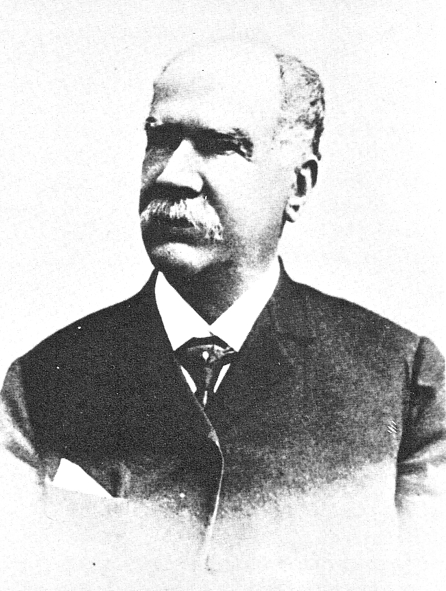 Luis Felipe Villarán (1845-1920), jurista, sociólogo, catedrático y político peruano.